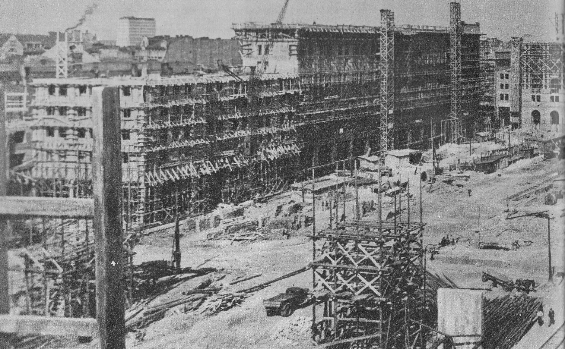 Budowa Marszałkowskiej Dzielnicy Mieszkaniowej (MDM) w Warszawie, kwiecień 1952